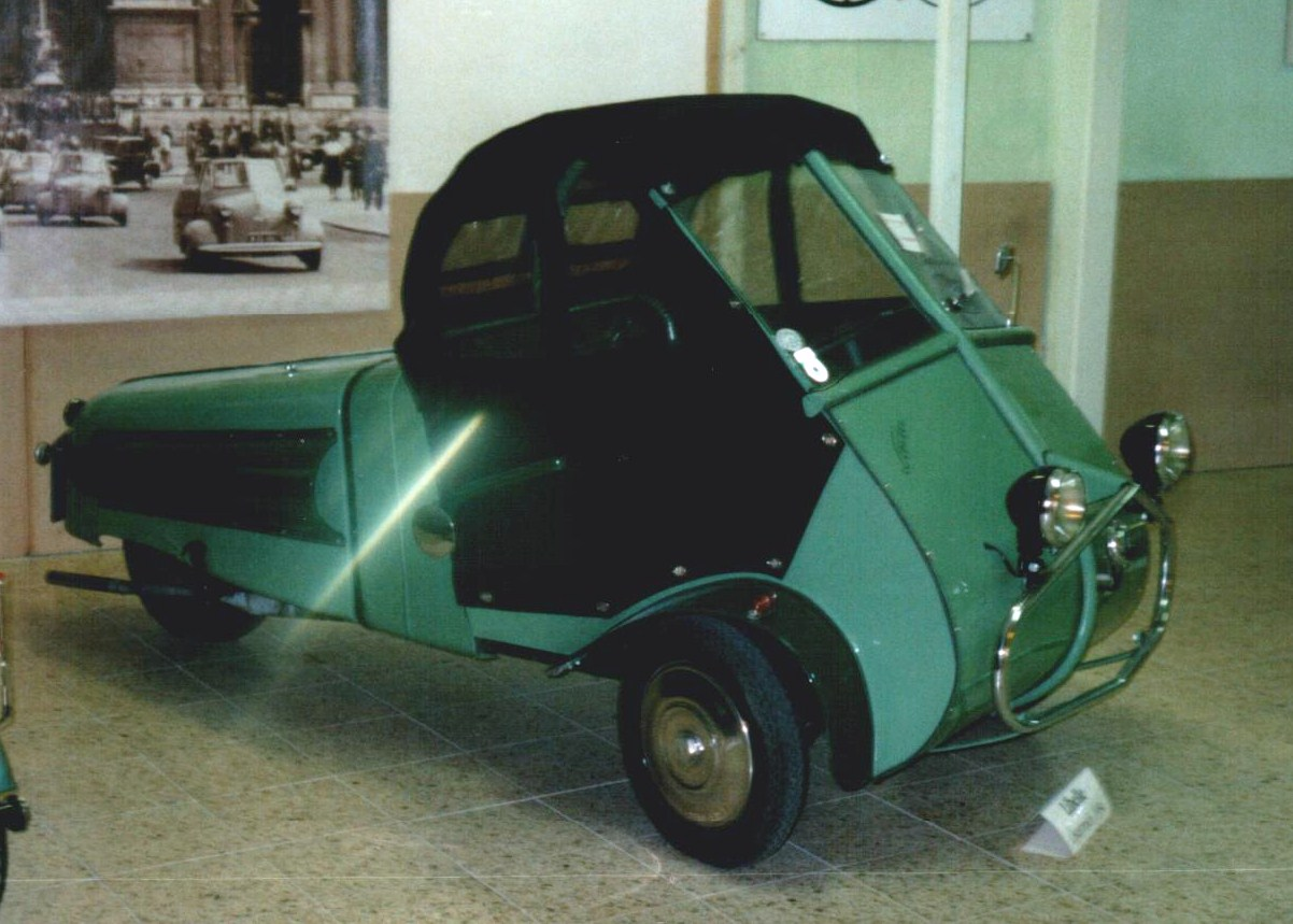 Libelle 1954